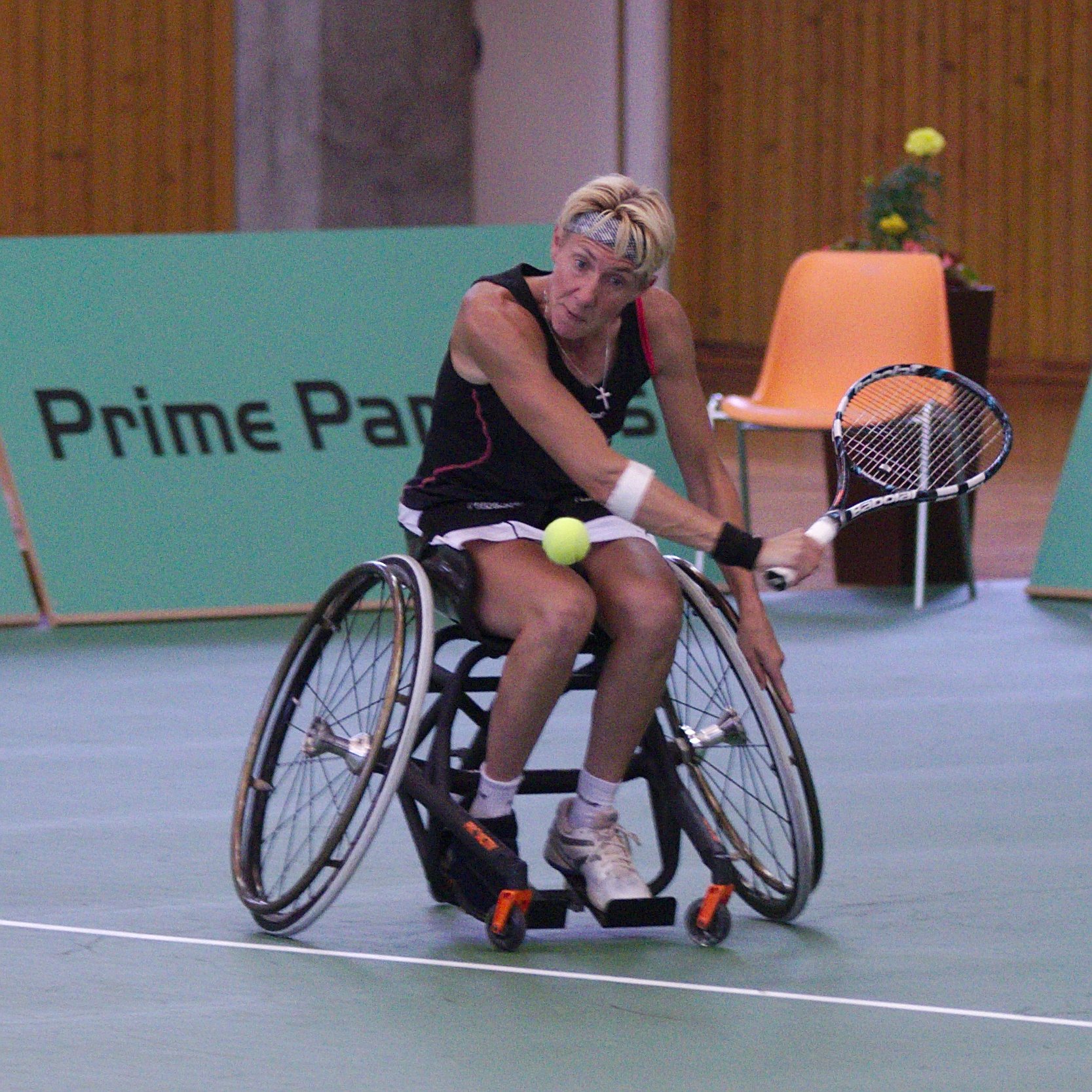 Swiss Open Geneva - 20140712 - Semi final Women - C. Famin vs S. Ellerbrock